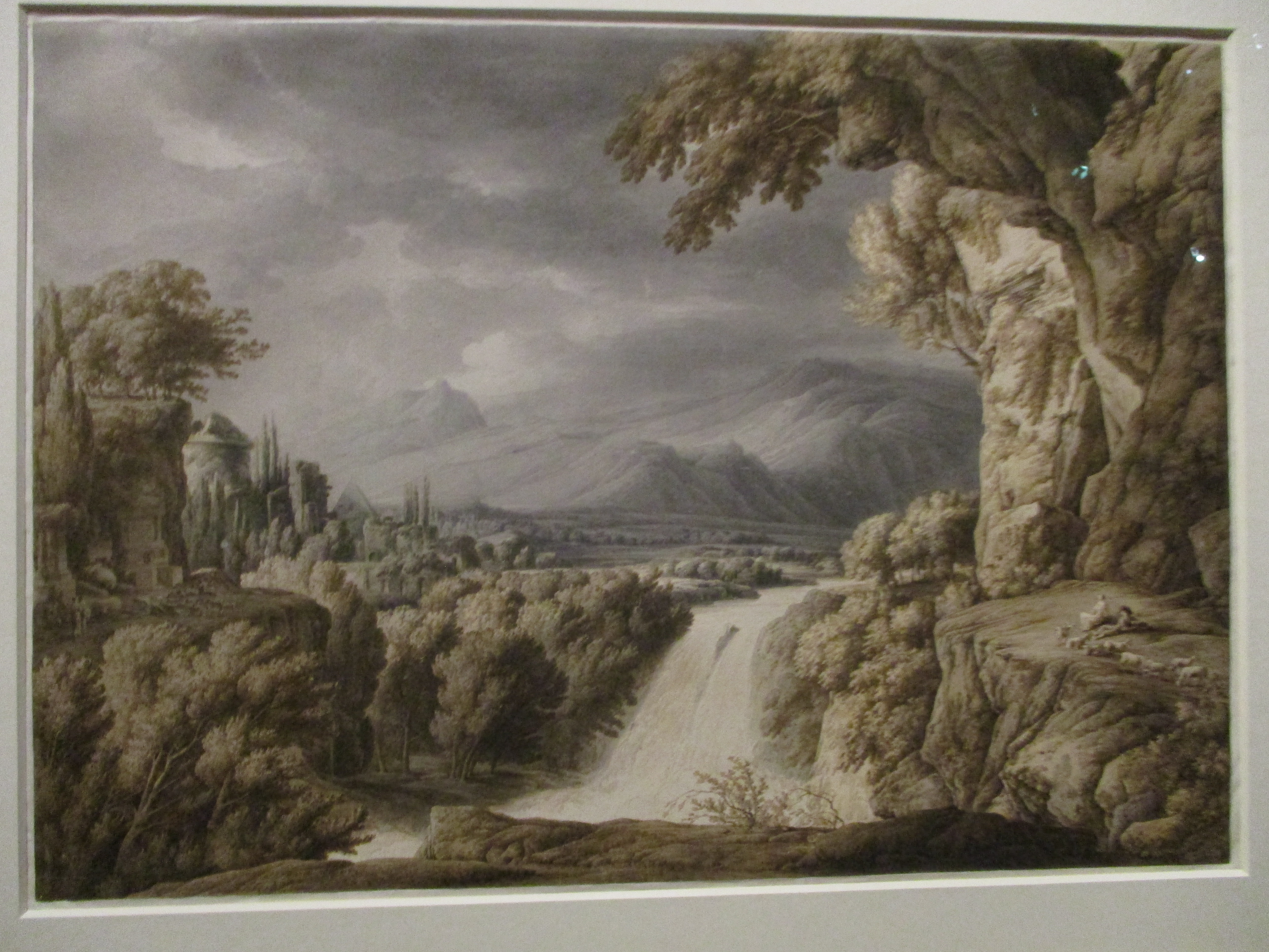 Franz Kobell (1749-1822) Paysage avec cascade (sans date). Plume et encre brune, lavis gris et brun, crayon graphite sur papier. Présenté à l'exposition L'Allemagne romantique 1780-1850 au Petit Palais (Paris) du 22 mai 2019 au 1er septembre 2019.